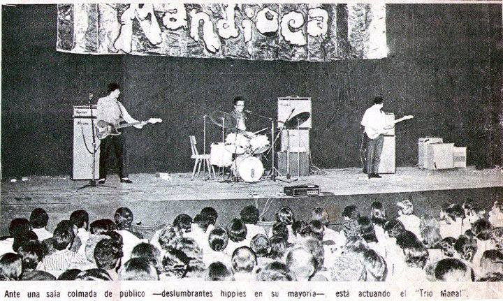 12 de noviembre de 1968, día del lanzamiento del sello Mandioca y debut del Trío Manal en el Teatro Apolo de la Av. Corrientes. Foto del archivo de Pedro Pujo.